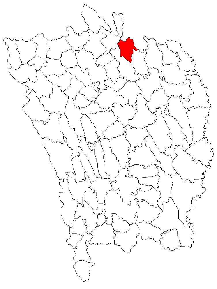 Categorie:Hărţi ale judeţului Vaslui